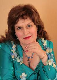 Олійник Ольга Борисівна — академік АН вищої школи України